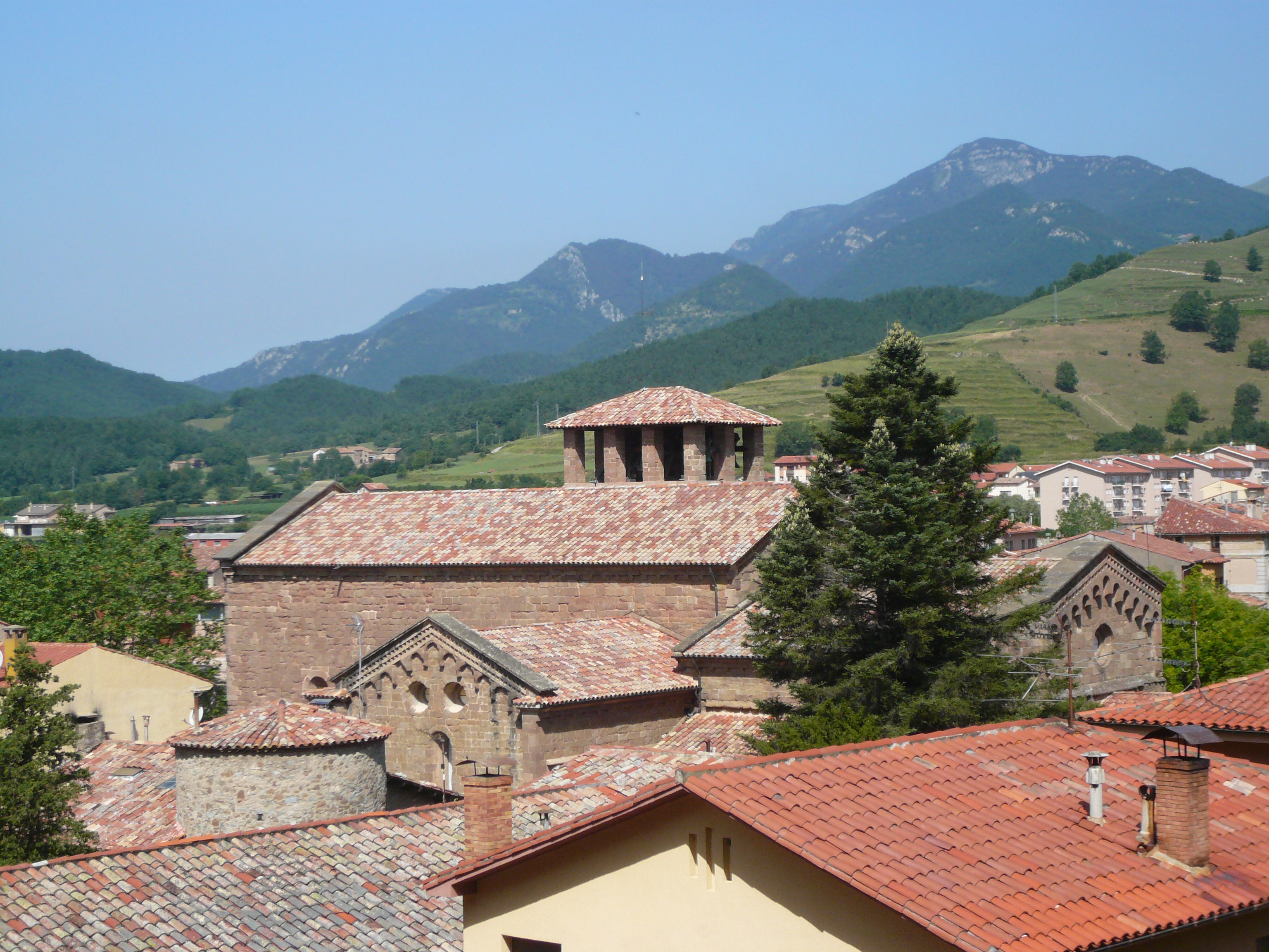 Monestir de Sant Joan de les Abadesses. Pl. de l'Abat Oliba (Sant Joan de les Abadesses). Object location42° 13′ 57.54″ N, 2° 17′ 10.81″ E